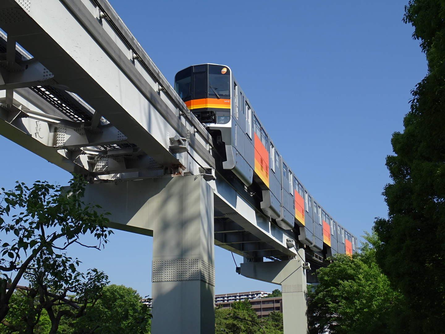 多摩ニュータウンを走る多摩モノレール（松が谷駅付近） 15/06/04